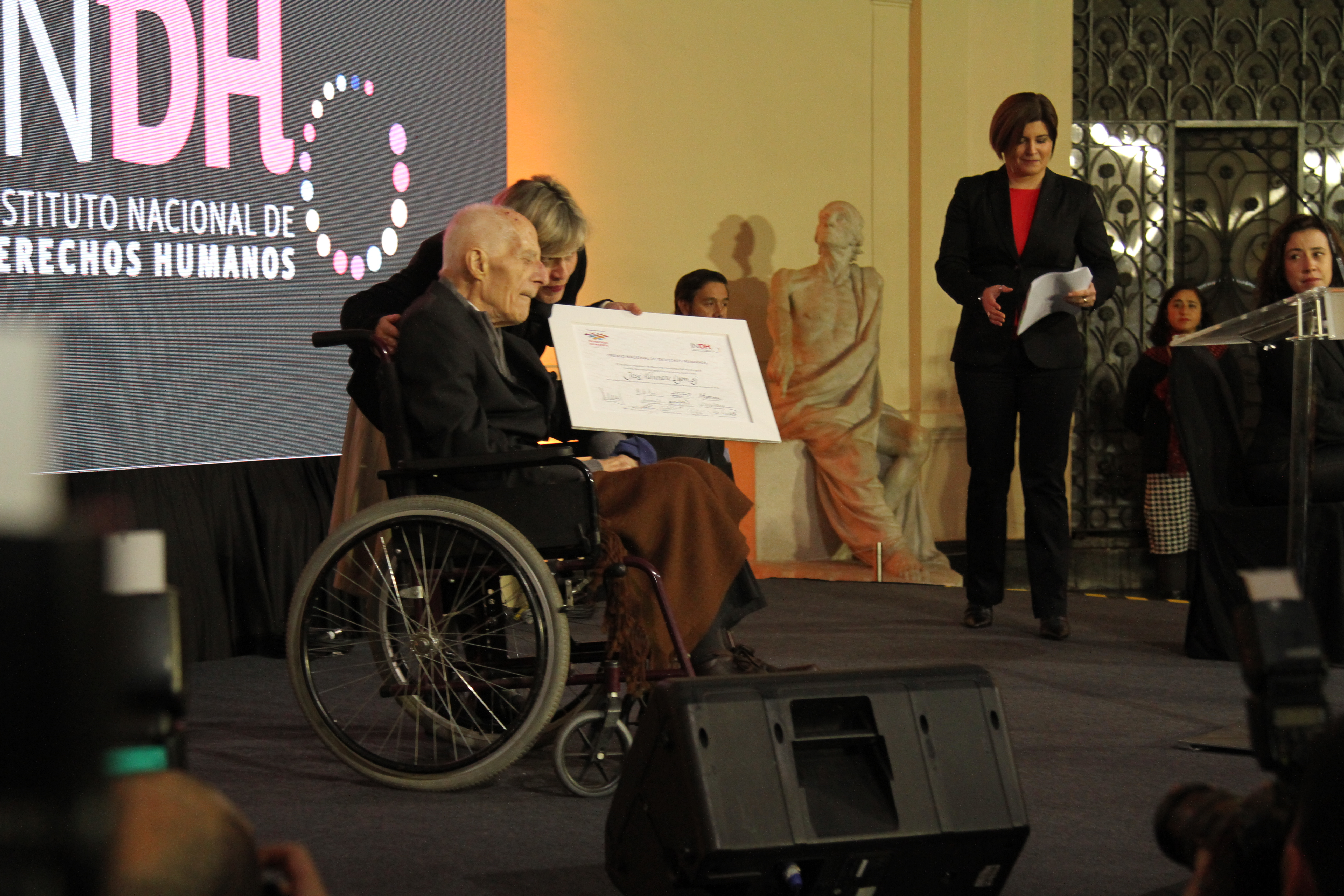 Ministro Víctor Osorio asiste a nombramiento de Premio Nacional de Derechos Humanos a Padre José Aldunate